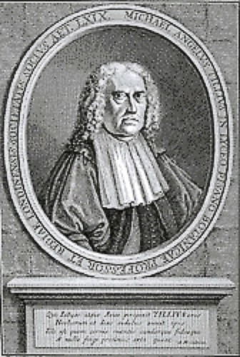 Michelangelo Tilli (1655-1740)